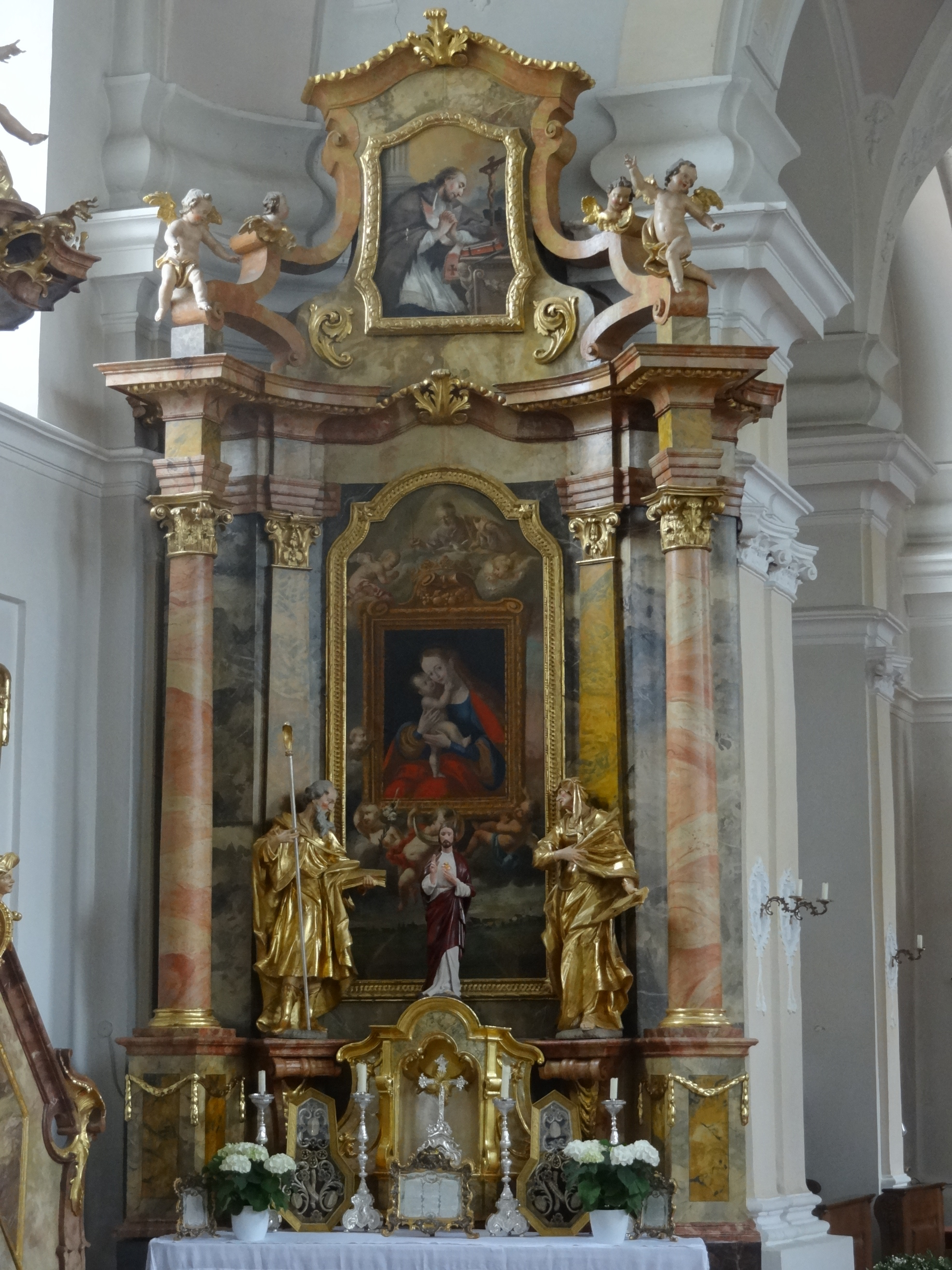 Linker Seitenaltar der Pfarrkirche St. Martin in Langenpreising (Landkreis Erding, Oberbayern)